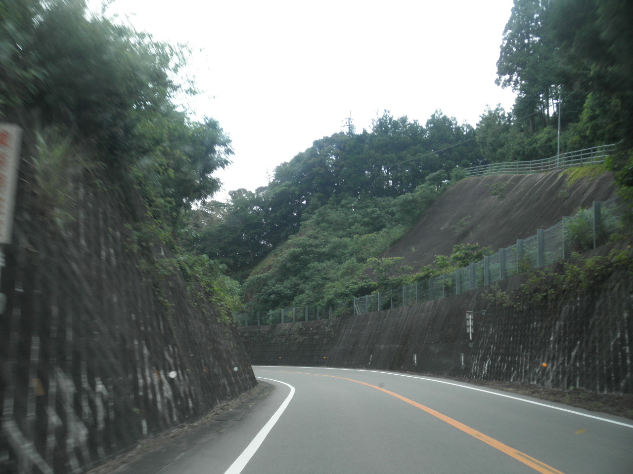 徳島県阿南市山口町串坂 国道195号